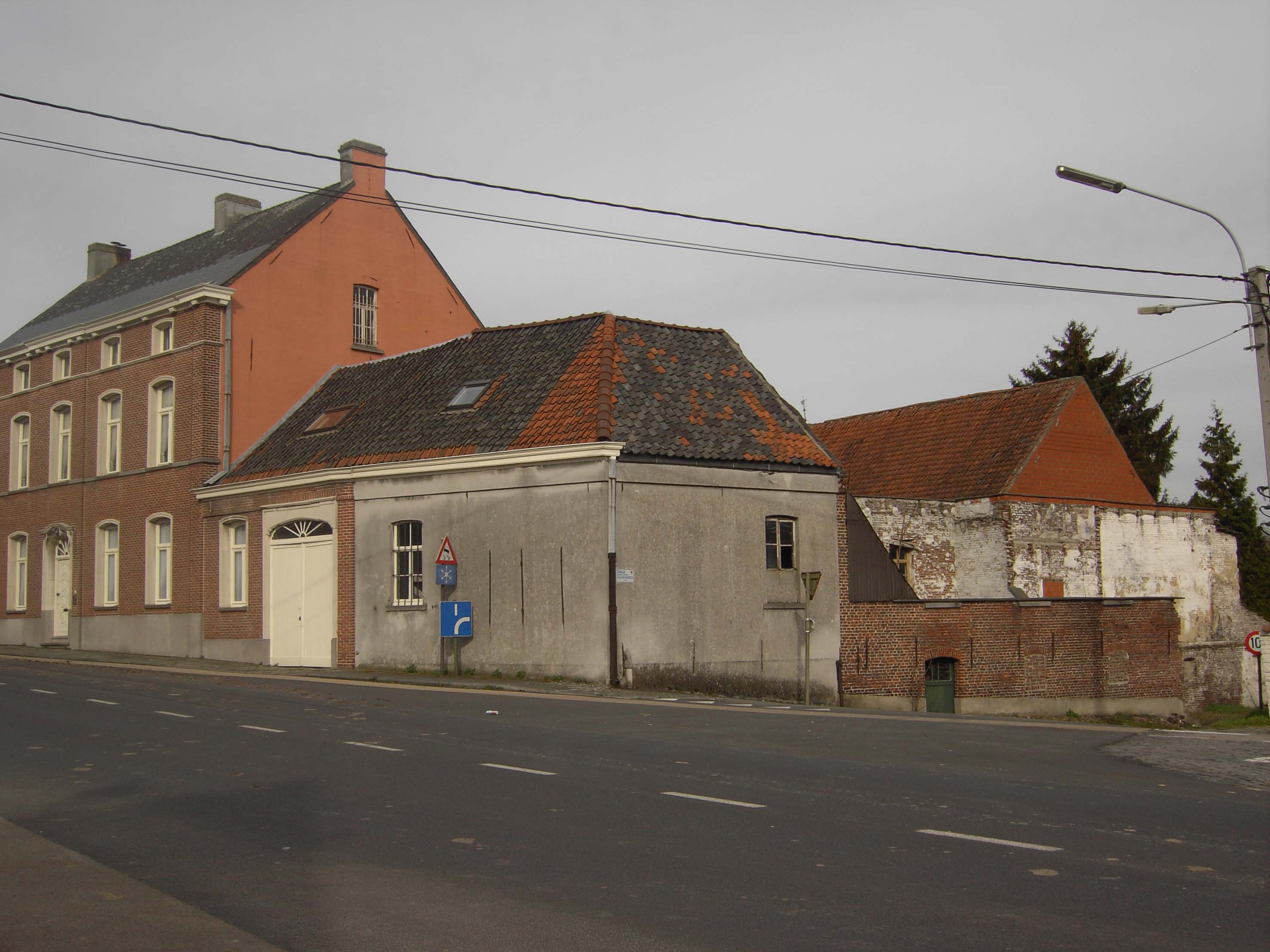 Beerlegem - former brewery De Geyter (Zwalm)